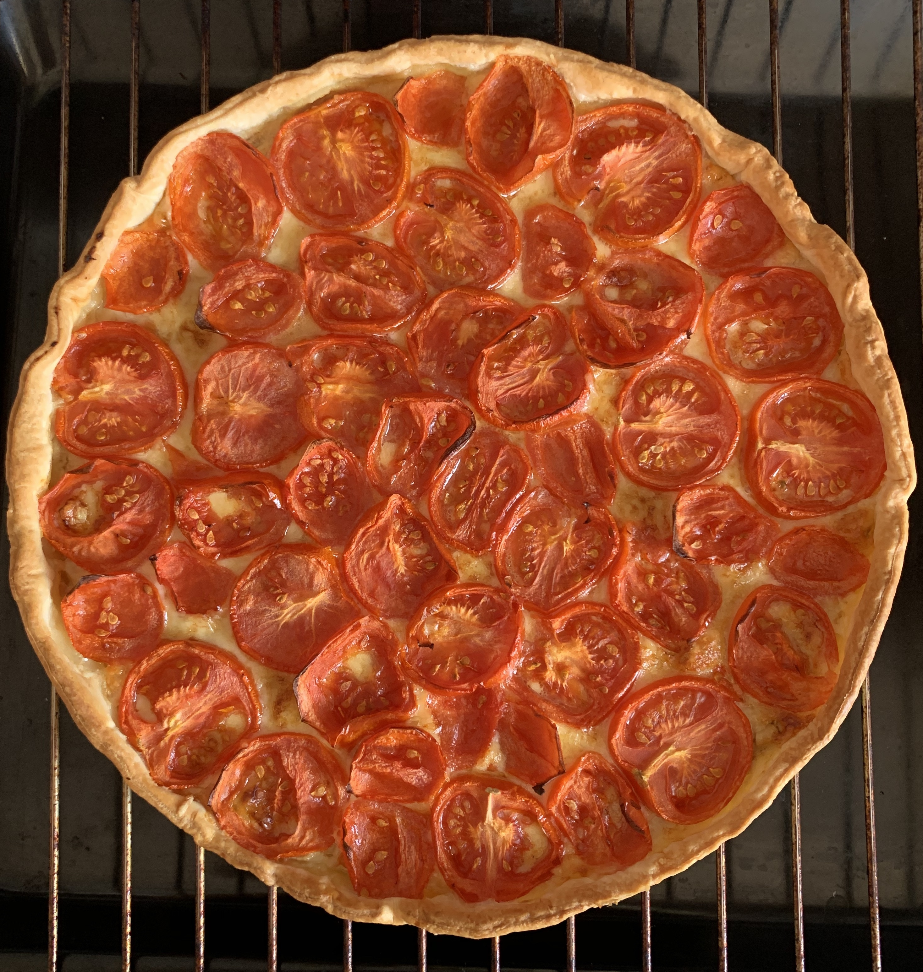 Tarte à la tomate tout juste sortie du four.